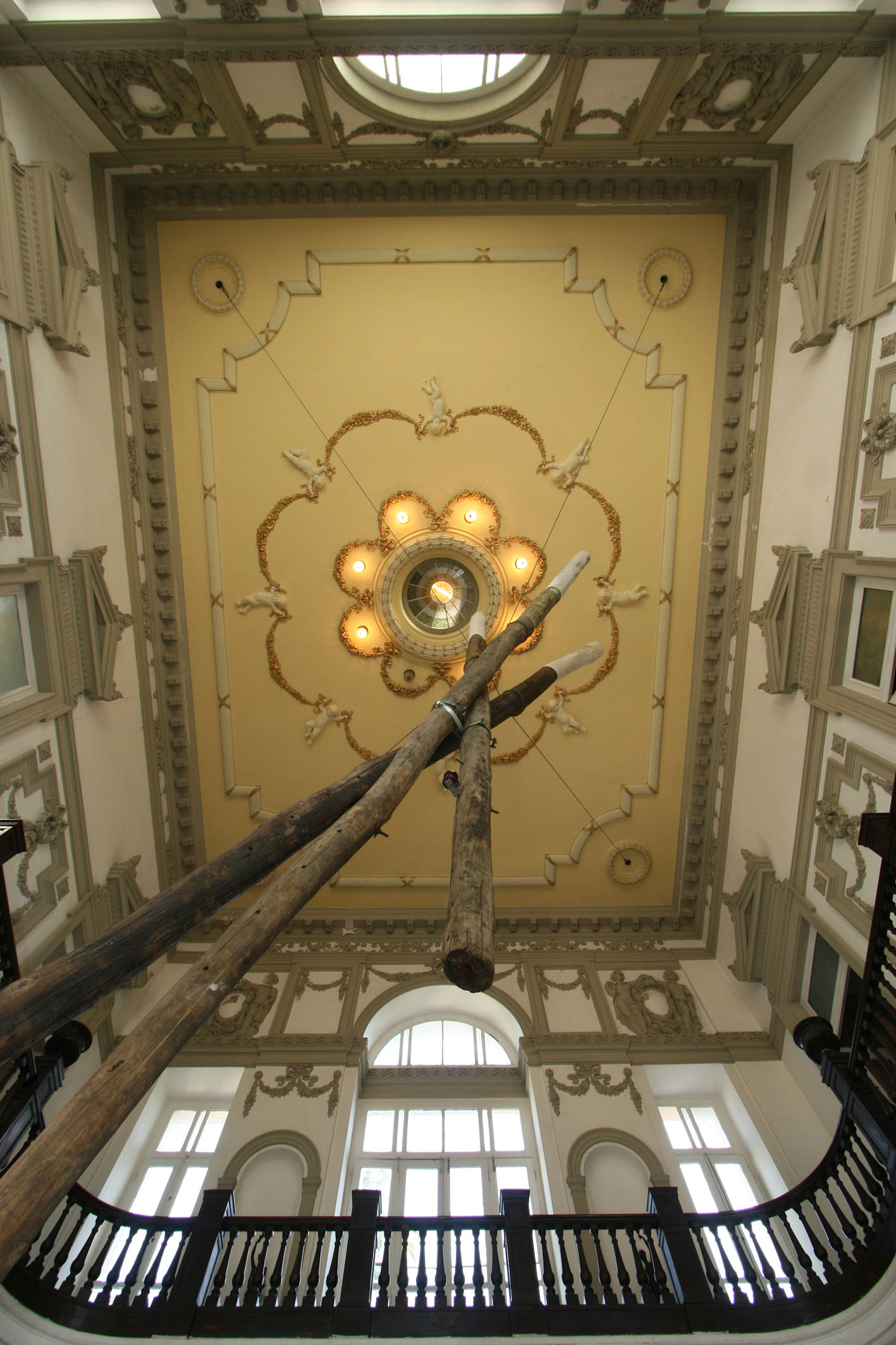 Segundo encontro baiano de Museus Na foto: Palácio da Aclamação Foto: Rafael Martins/AGECOM